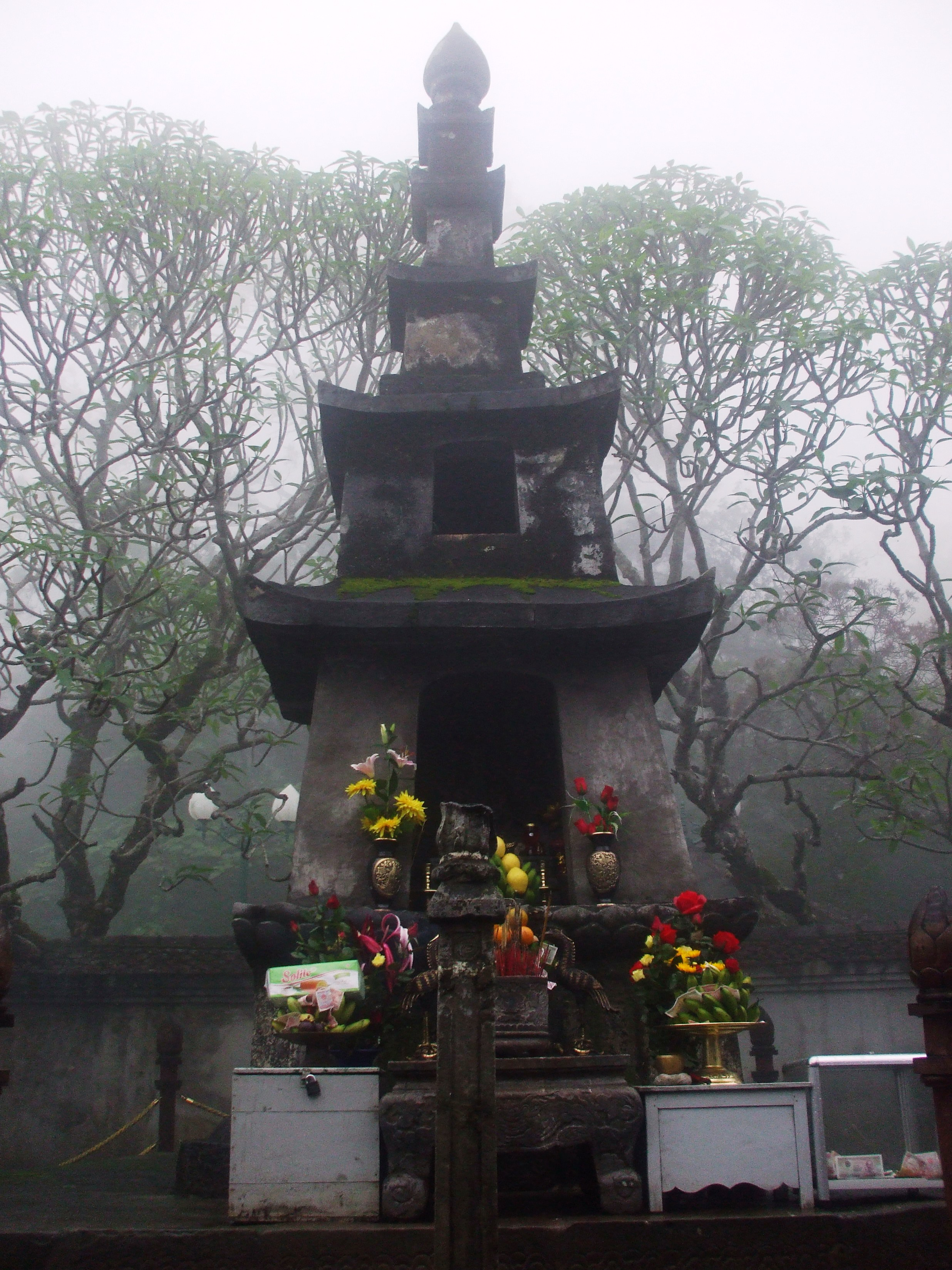 Tháp Huệ Quang nằm trong vườn tháp ở phía trước chùa Hoa Yên, trên núi Yên Tử (Quảng Ninh, Việt Nam), được dựng thời Trần, sau bị đổ, đầu thời Lê đã trùng tu lại. Đây là nơi đặt một phần xá lỵ của Điều Ngự Giác Hoàng Trần Nhân Tông.